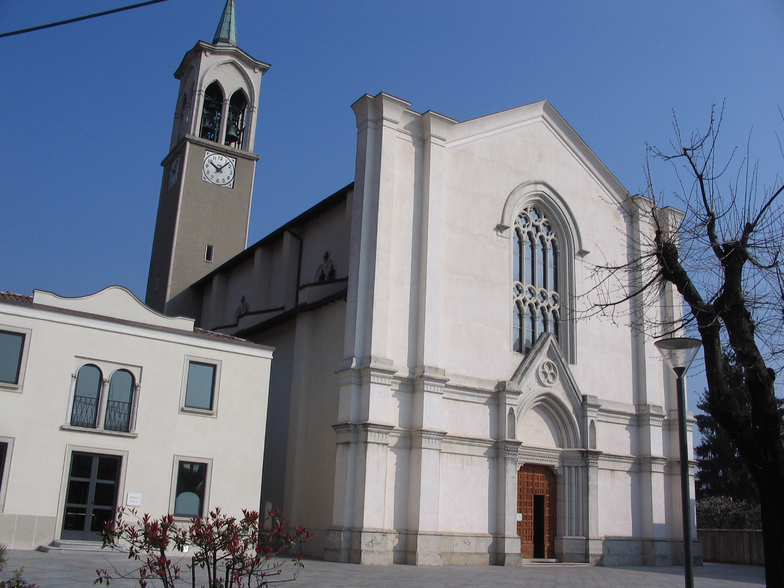 Autore Giorces. Ambivere, chiesa di San Zenone.